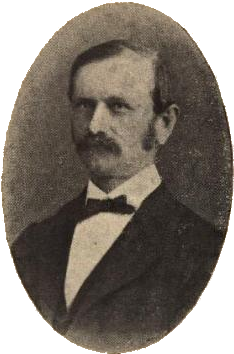 Riksarkivar Michael Birkeland (1830–1896).